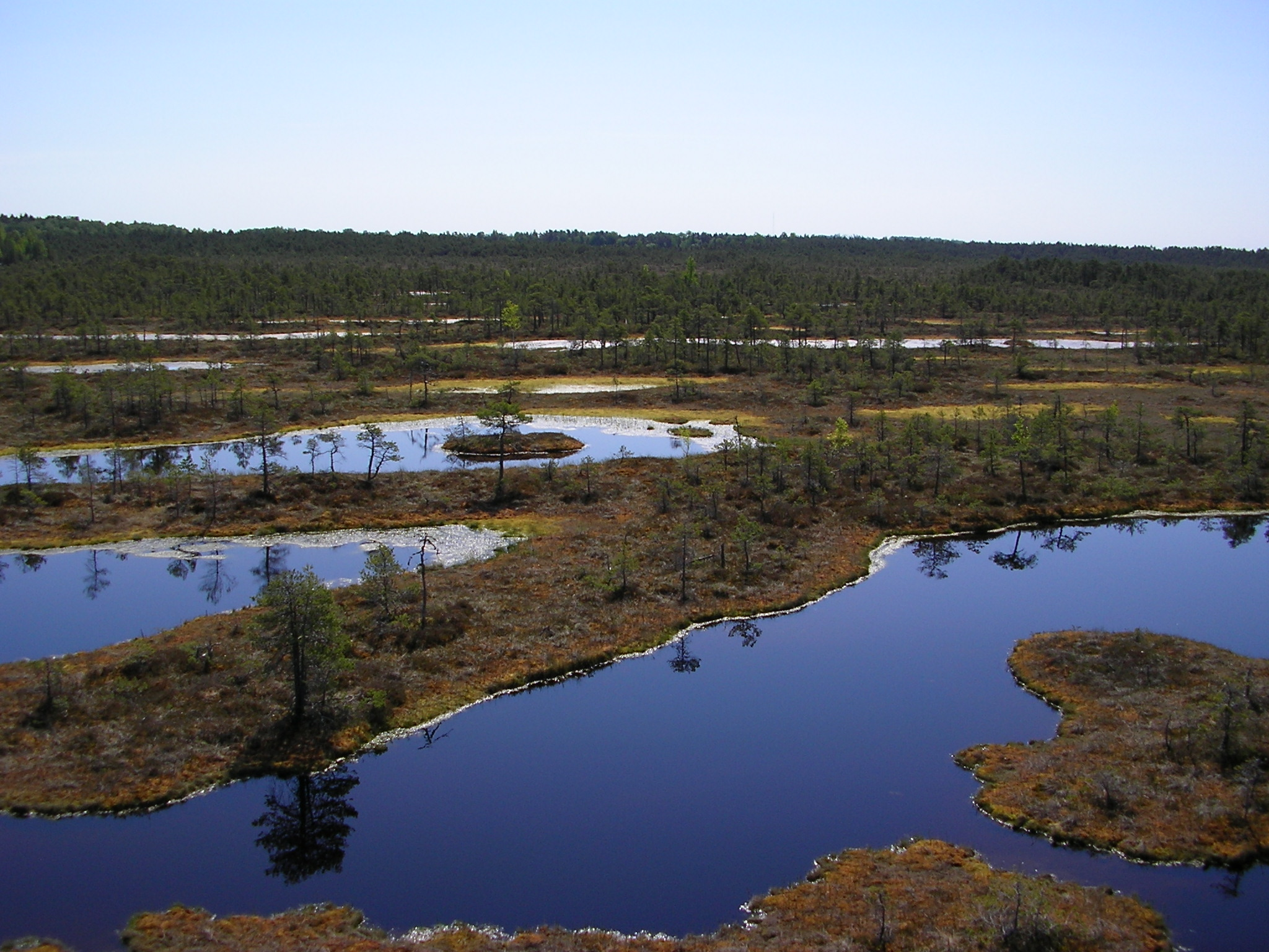 Sumpf am Männik-See